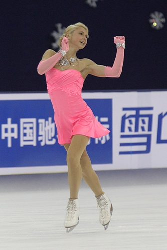 Ксения Макарова на Кубке Китая 2011